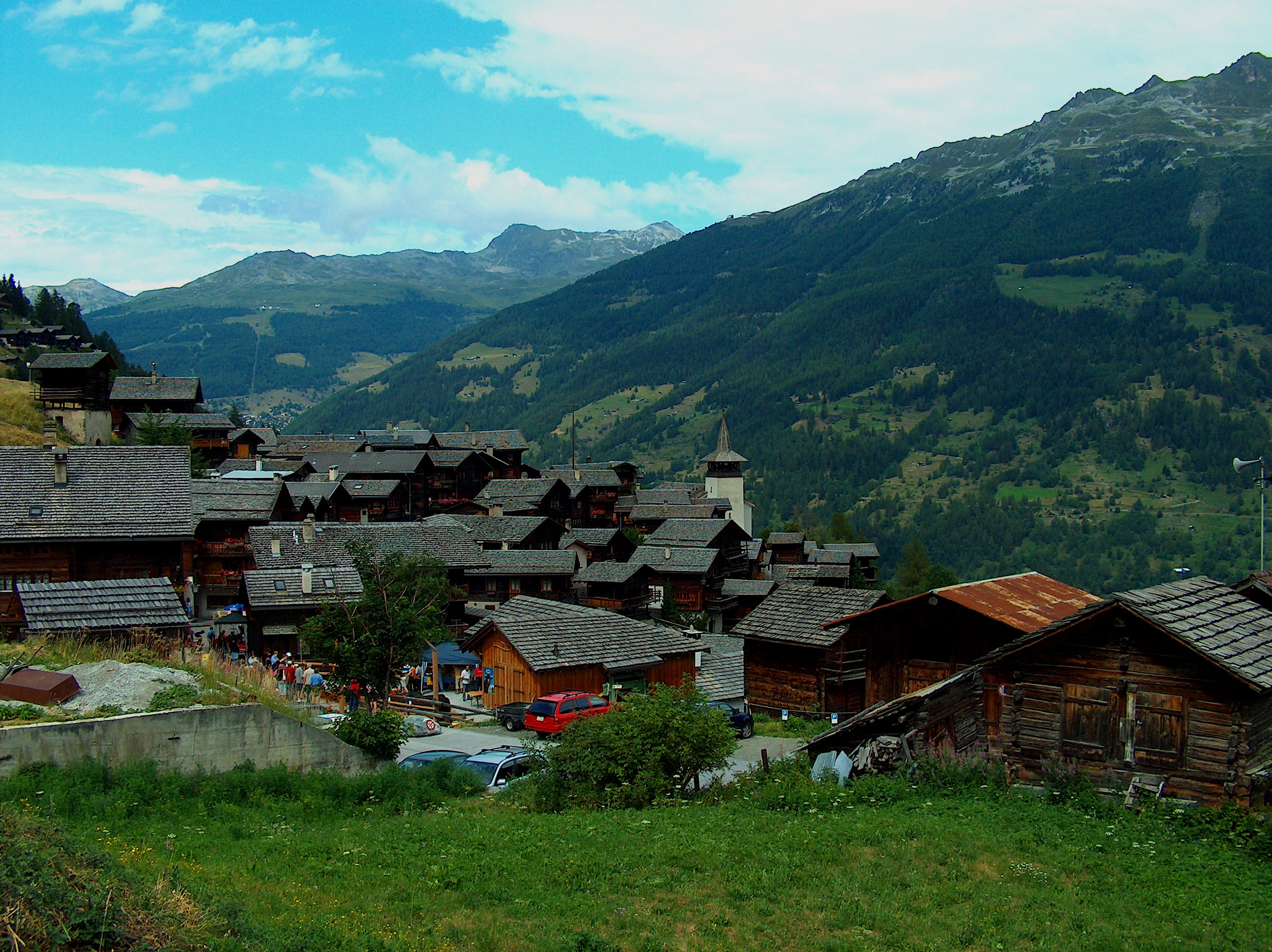 View at Grimentz/Switzerland